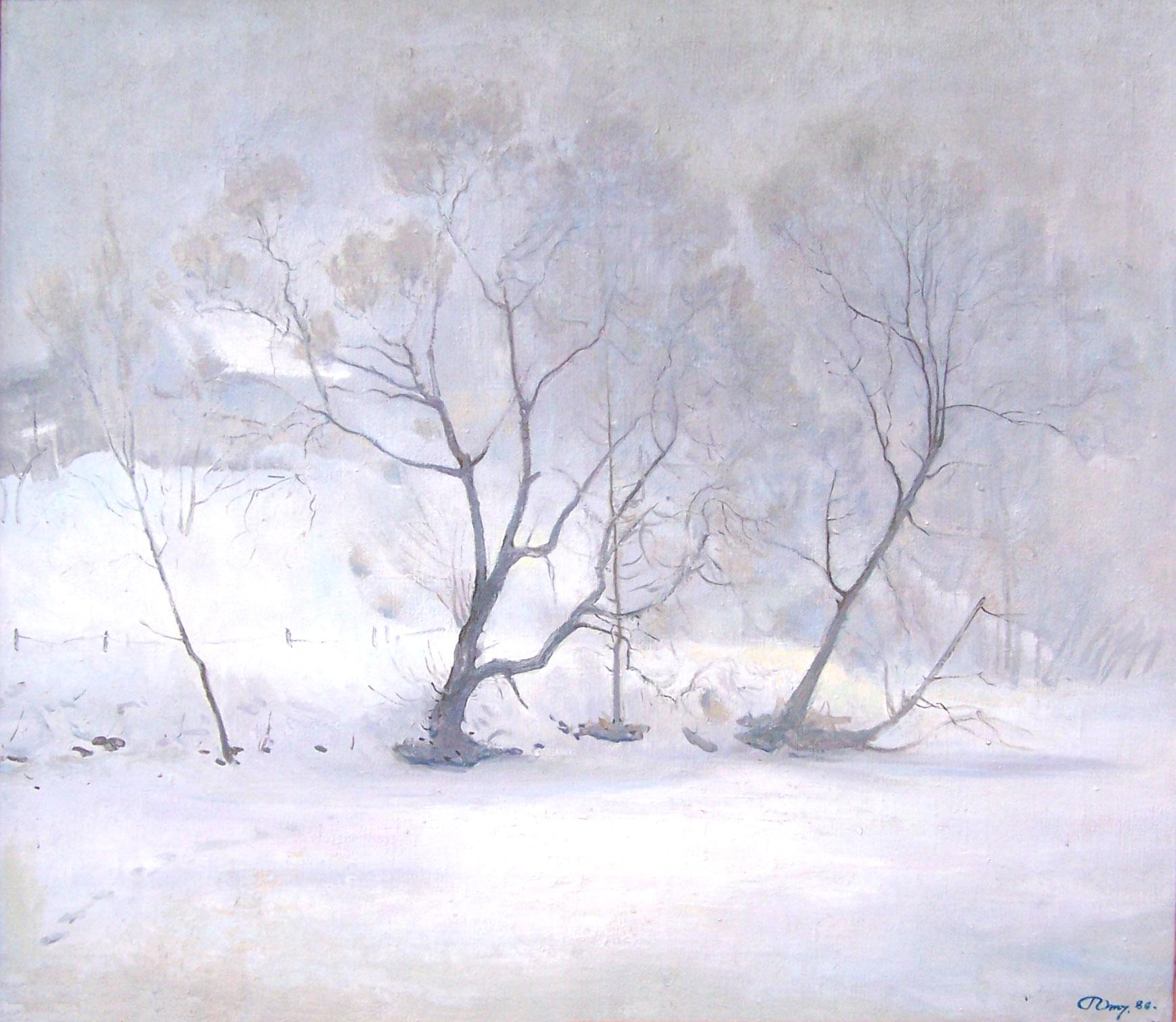 Туманное утро, 1986.